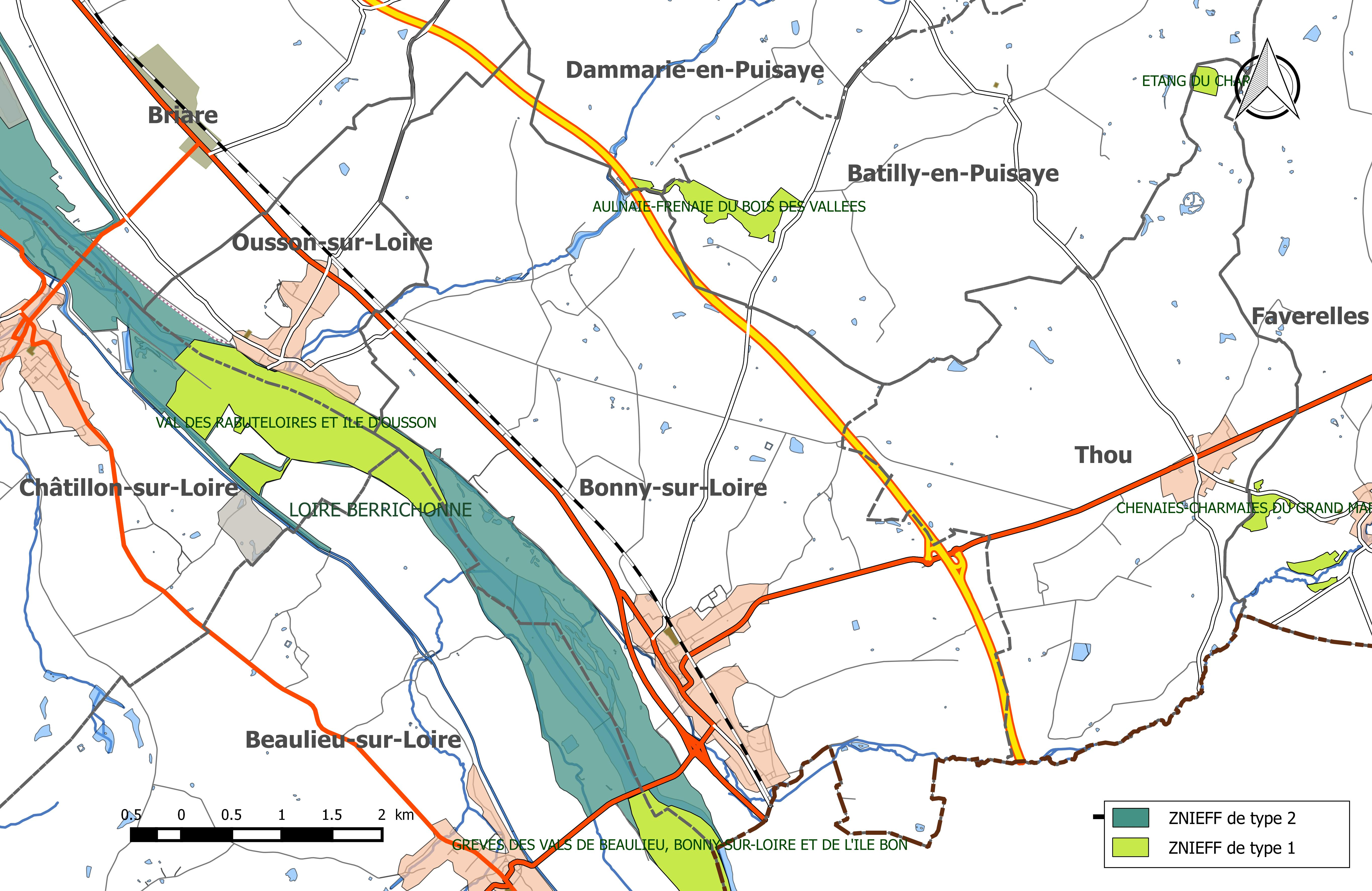 Carte des Zones naturelles d'intérêt écologique faunistique et Floristique (ZNIEFF) de la commune de Bonny-sur-Loire.